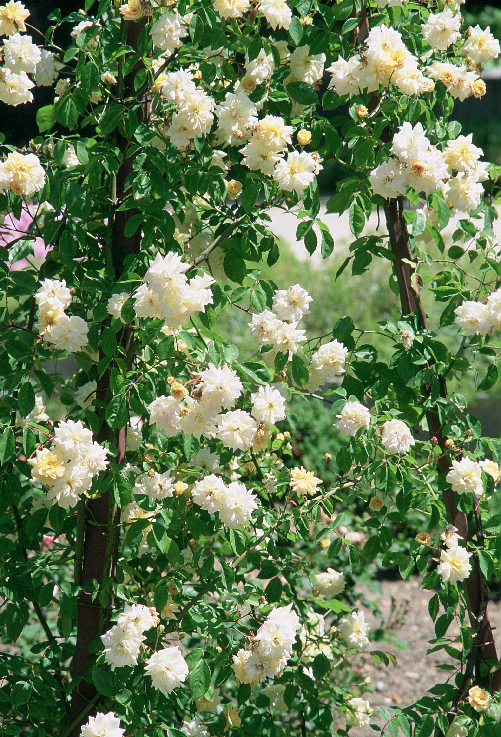 Rosa 'Alister Stella Gray', gr. Noisettianas, sect. Chinensis. Real Jardín Botánico, Madrid.